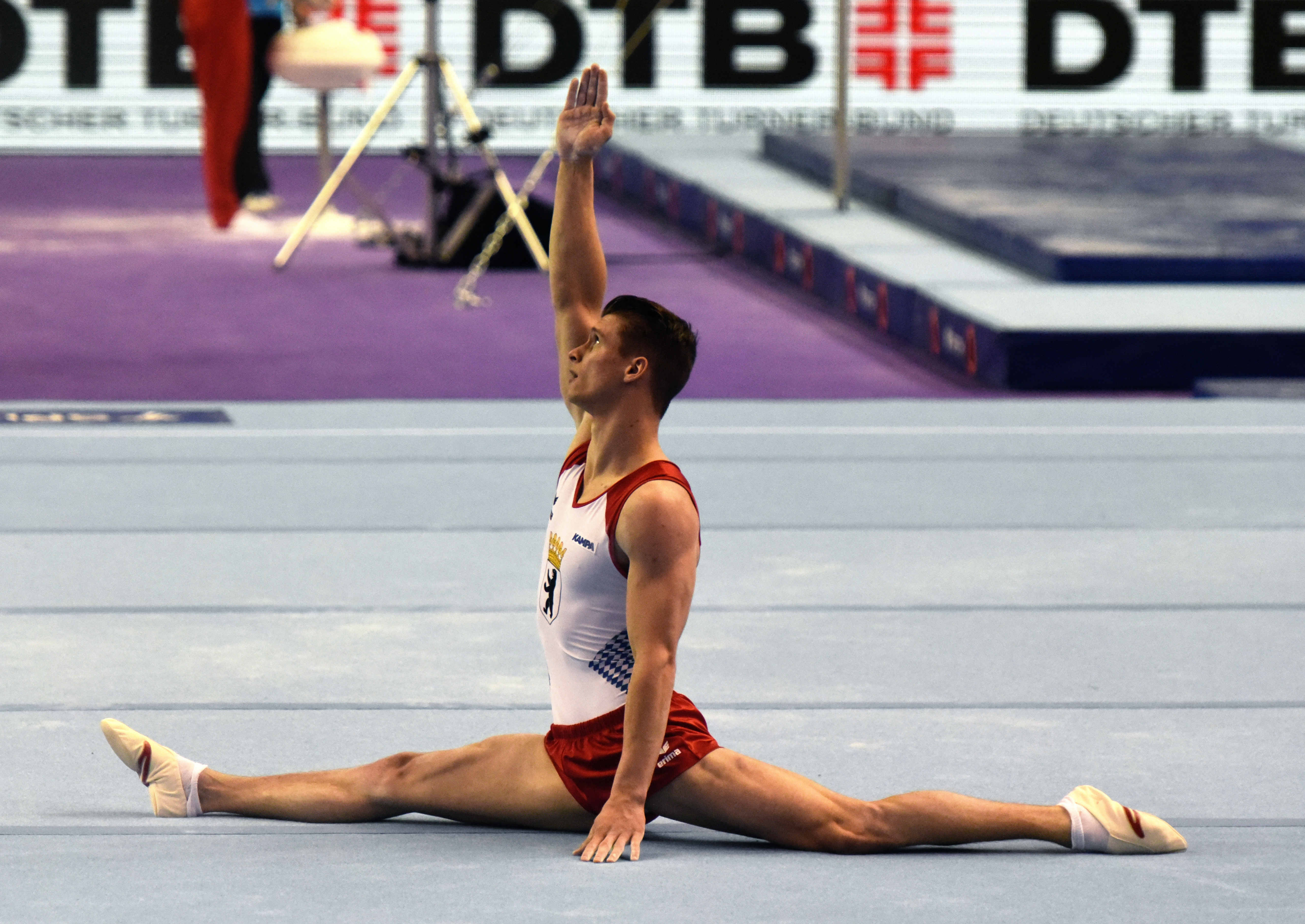 Deutsche Meisterschaften Gerätturnen Mehrkampf männlich Wettkampf beim Internationalen Deutschen Turnfest Berlin 2017. Abgebildet: Lukas Dauser.